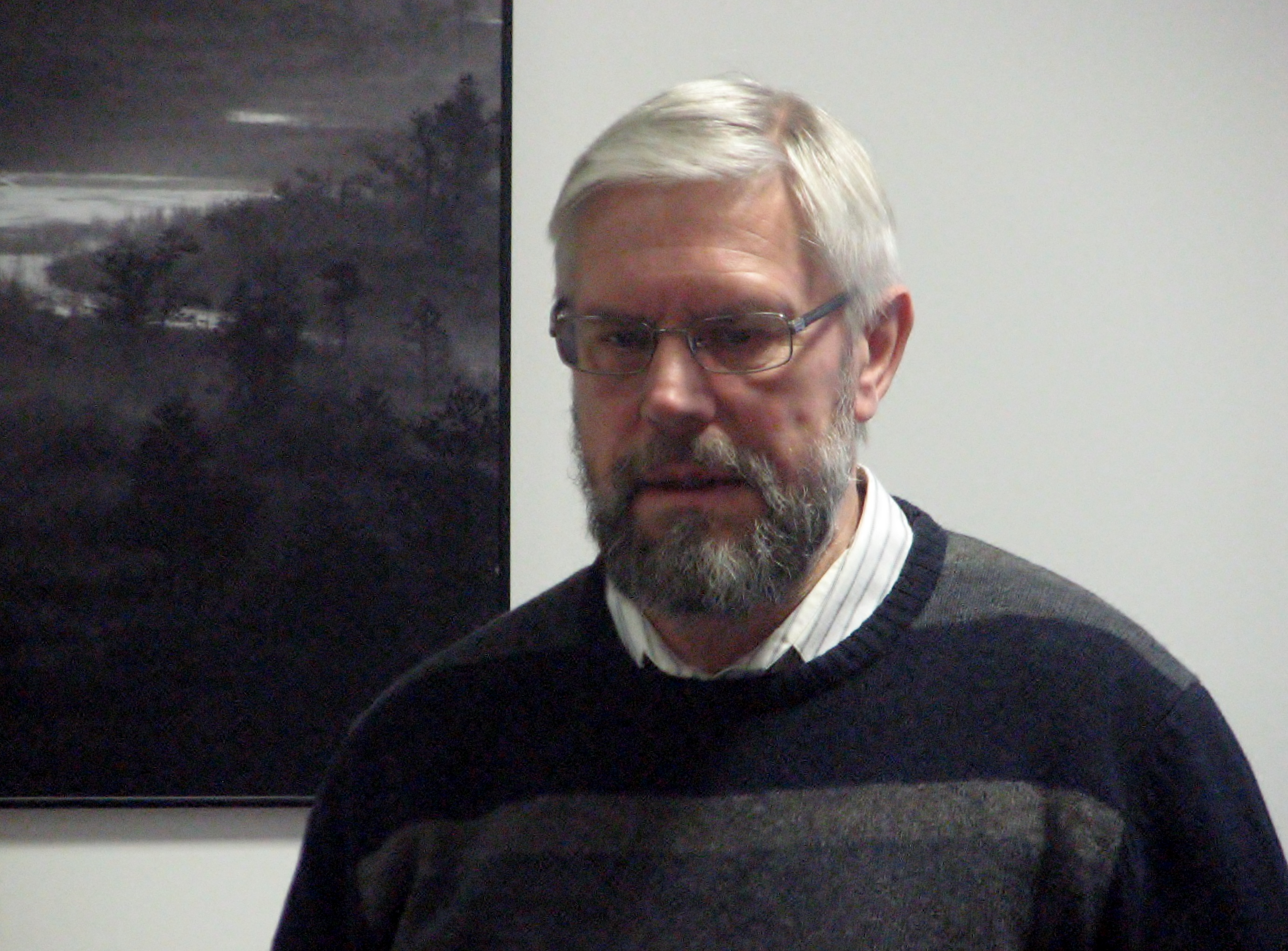 Jüri Viikberg Eesti Keele Instituudis Eesti õigekeelsussõnaraamatu esitlusel